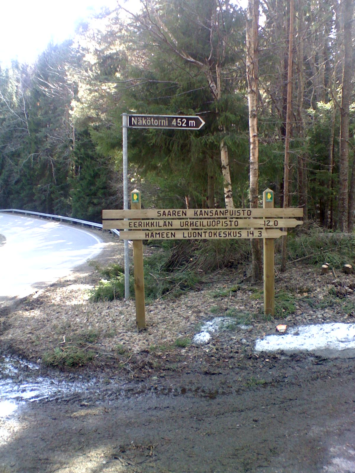 Saaren kansanpuisto